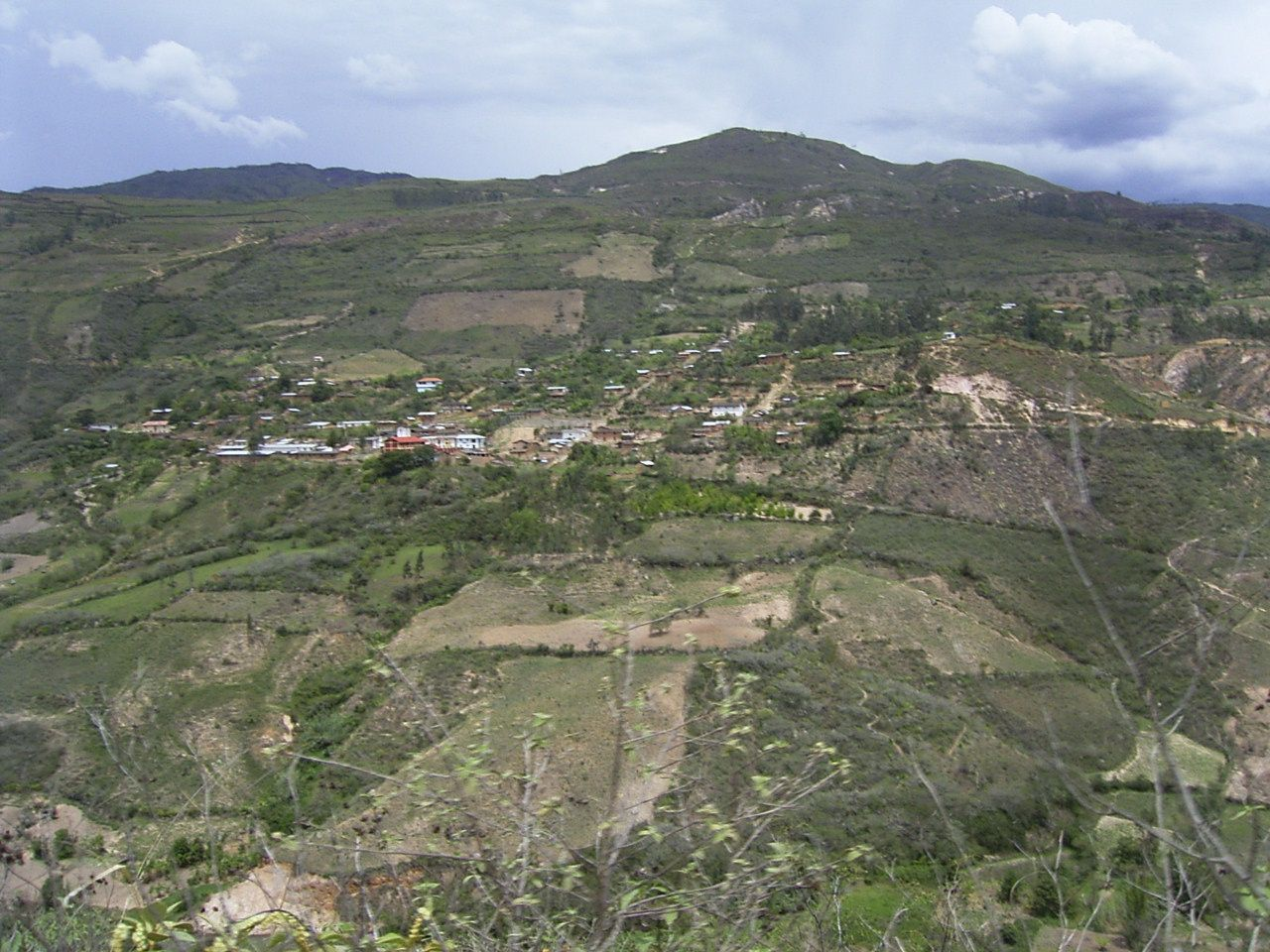 iglesia en Magdalena, Chachapoyas, Amazonas, Peru.